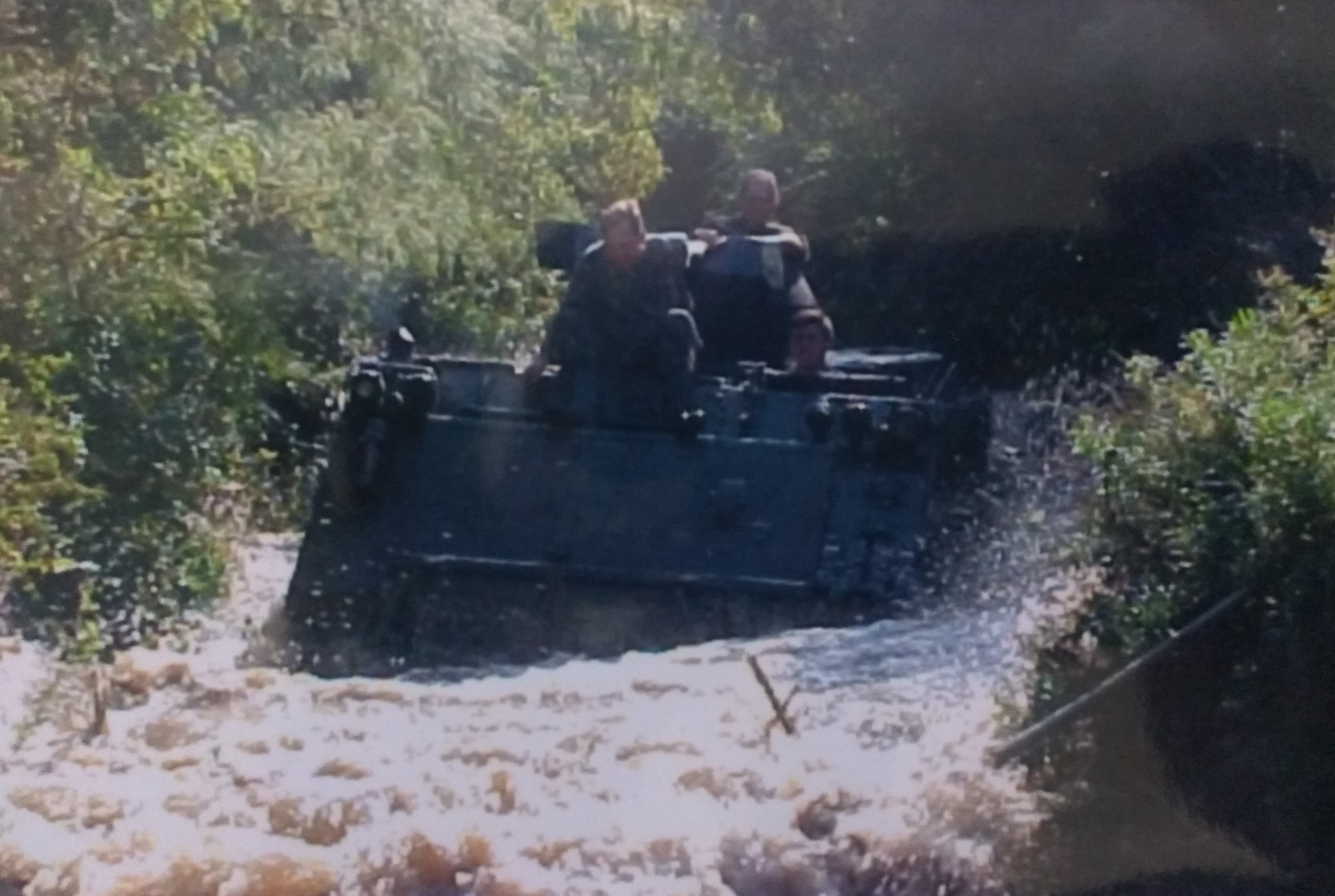 Blindado sobre lagartas. Foto em nossos arquivos.